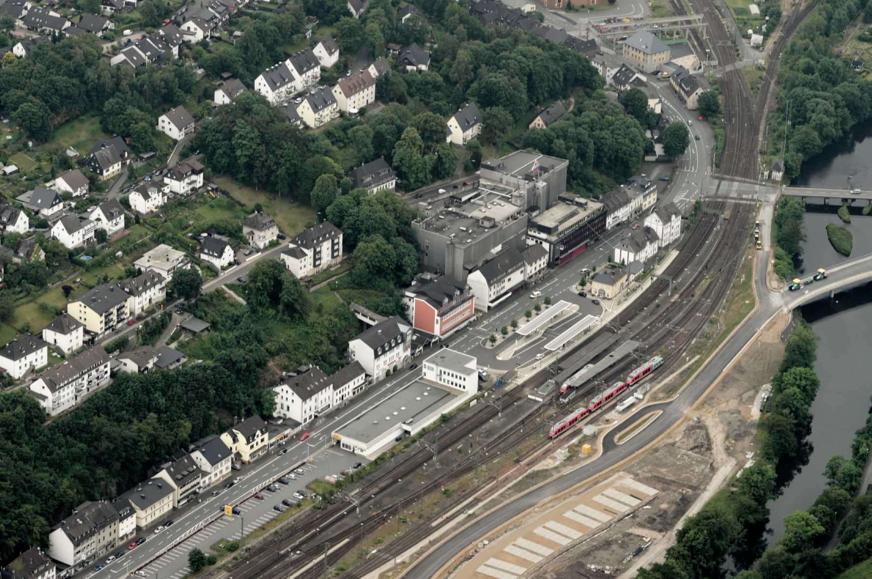 Fotoflug Sauerland Nord. Teilansicht Finnentrop mit Metten, Bahnhof und Lenne. The making of this document was supported by the Community-Budget of Wikimedia Germany.